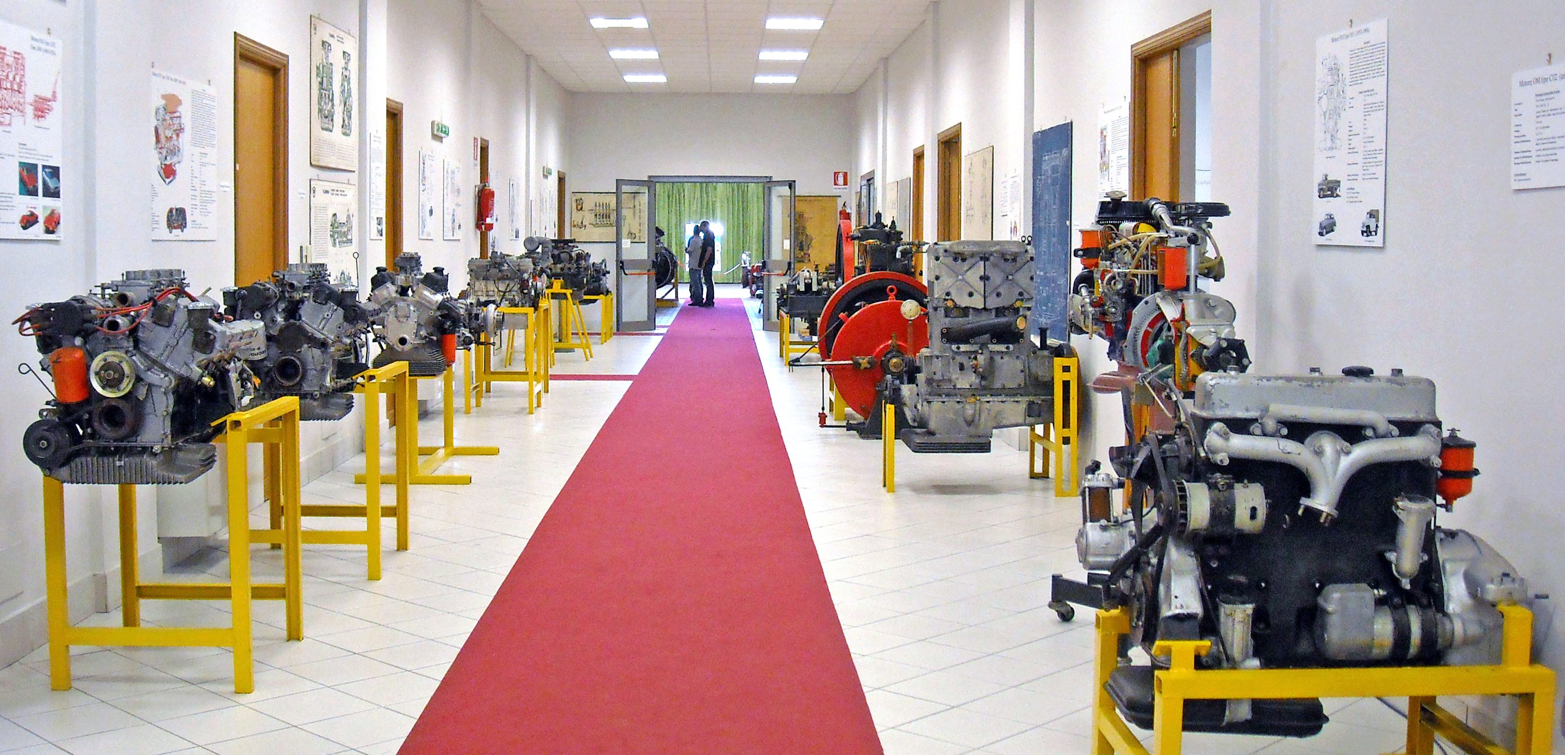 Area espositiva dei motori automobilistici